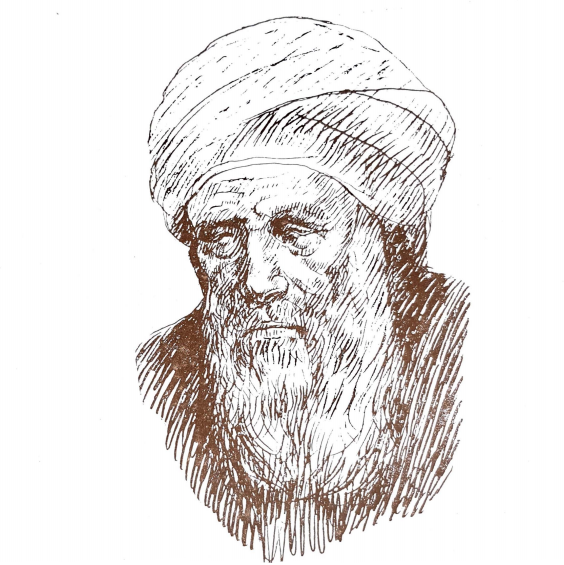 رسم لِأبي العلاء المعرِّي بِريشة جُبران خليل جُبران.